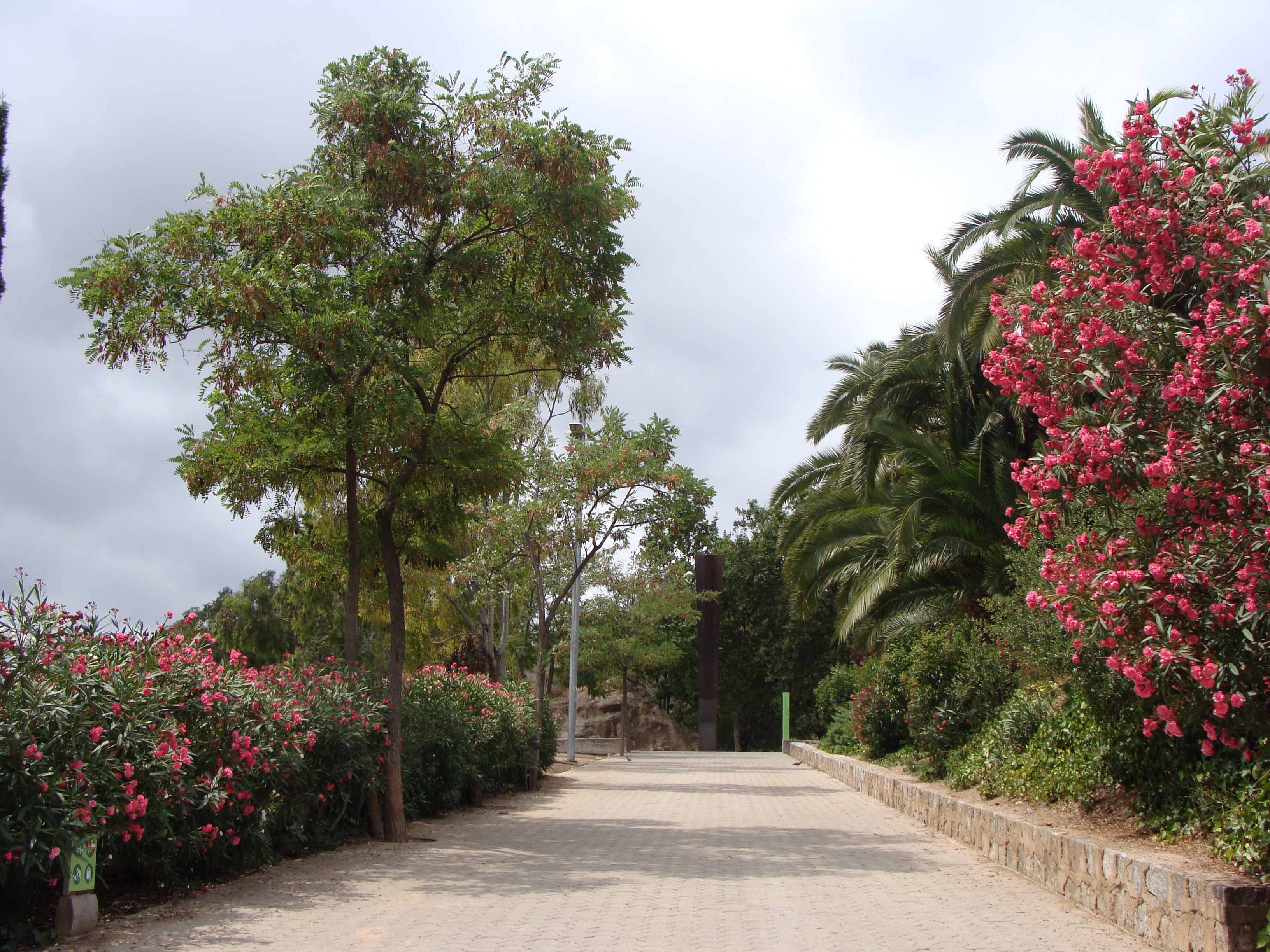 Accès al Parc de la Creueta del Coll pel Passeig Mare de Déu del Coll.